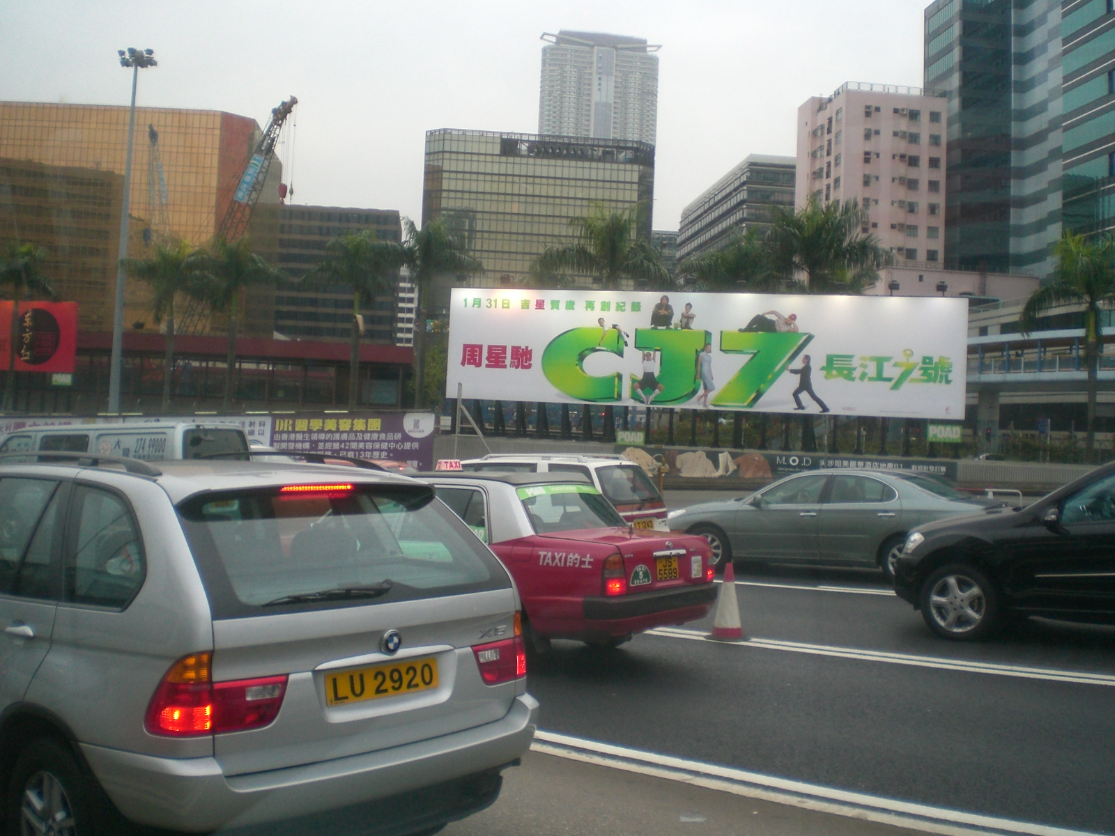 香港海底隧道九龍入口, 西望尖沙咀東, 電影長江七號海報橫額